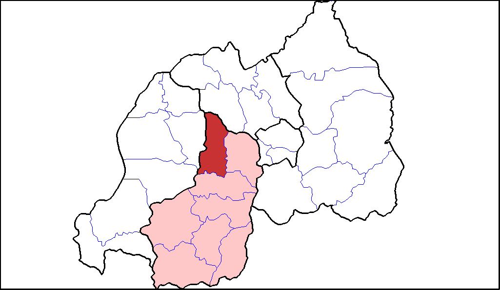 Distretto di Muhanga.